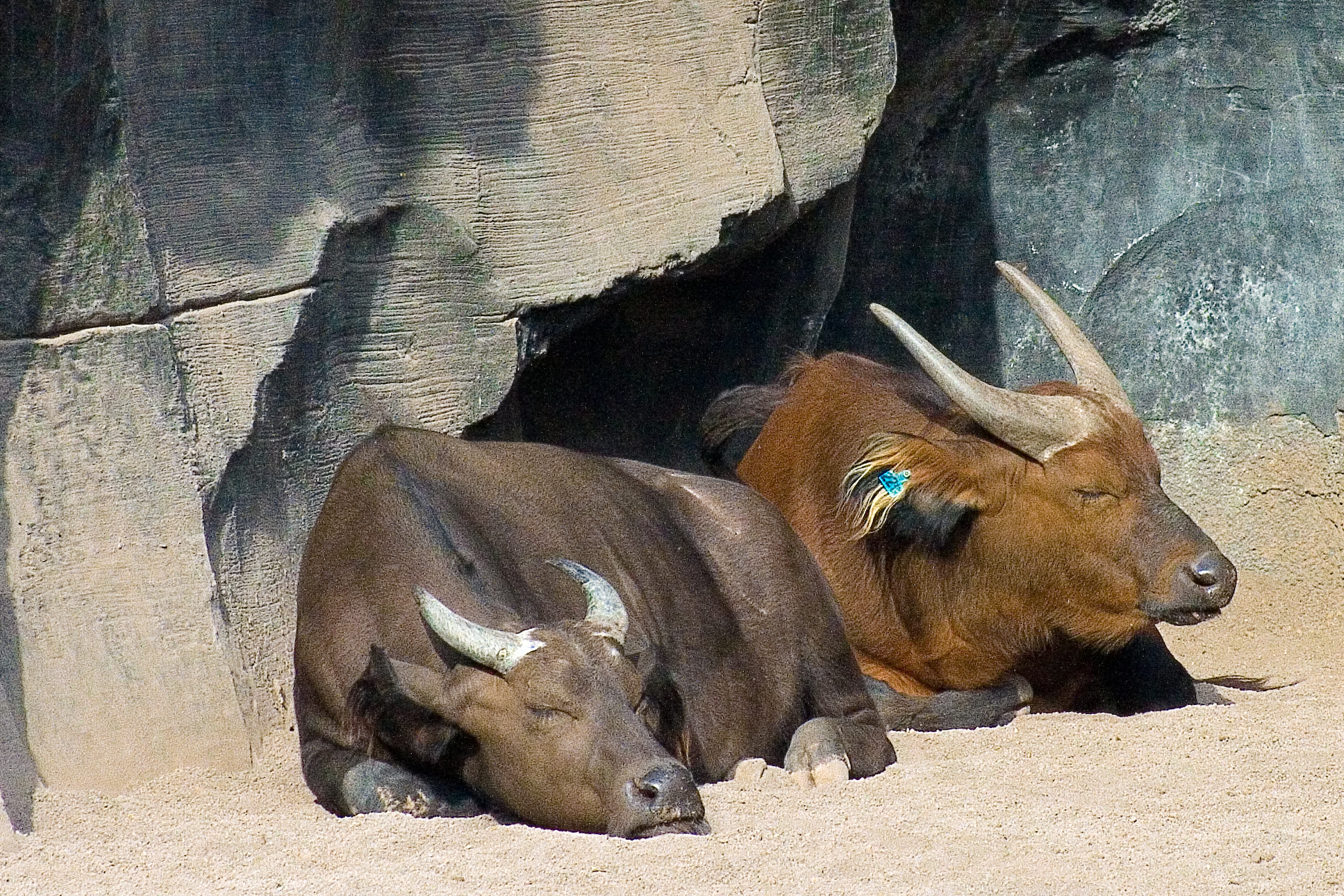 Debido a su comportamiento huidizo y su hábitat (los bosques densos), hay muy poca información sobre él.